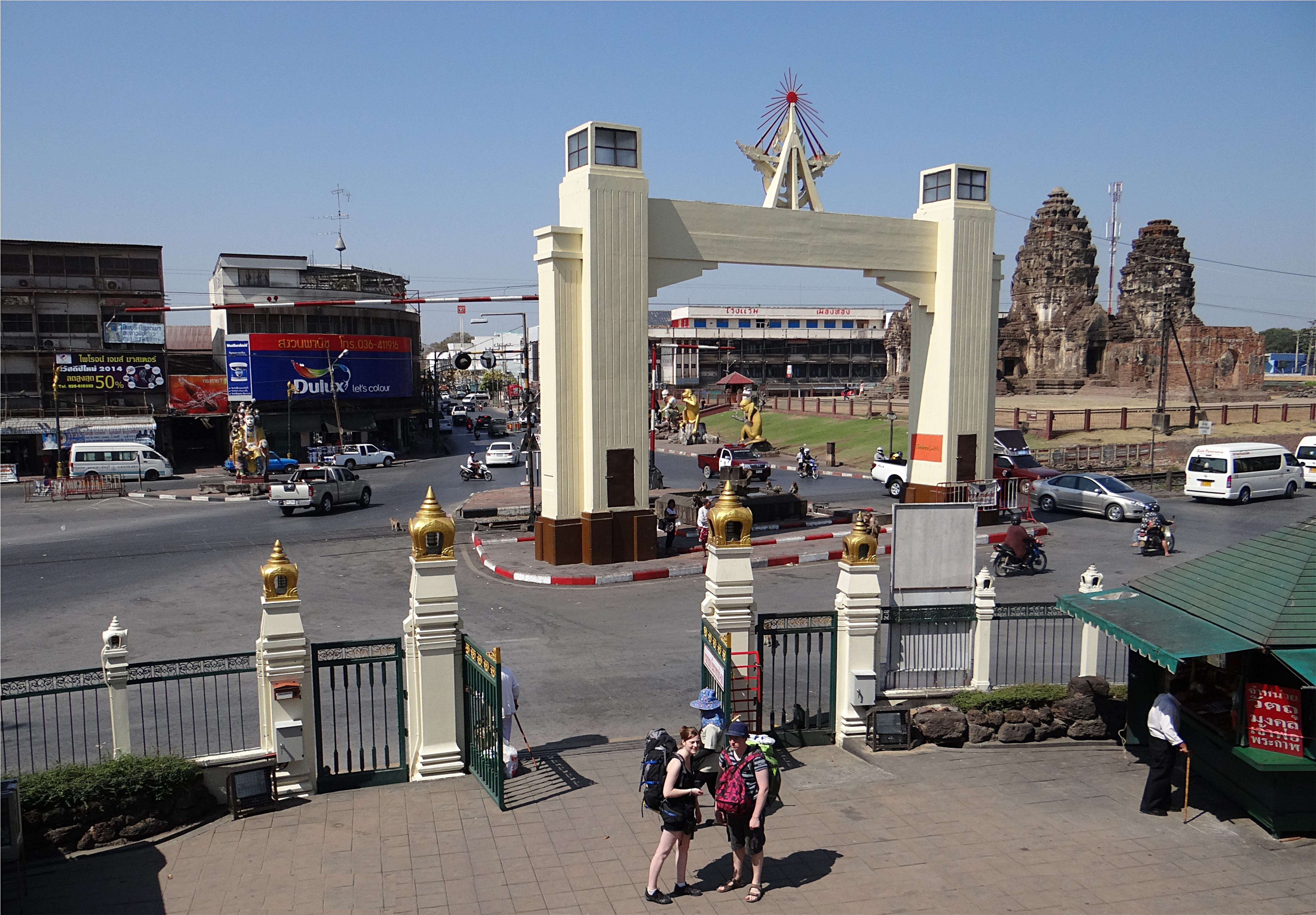 Prang Sam Yot road et le temple Phra Prang Sam Yod vu du sanctuaire de San Phra Kan, Lopburi, Thaïlande.